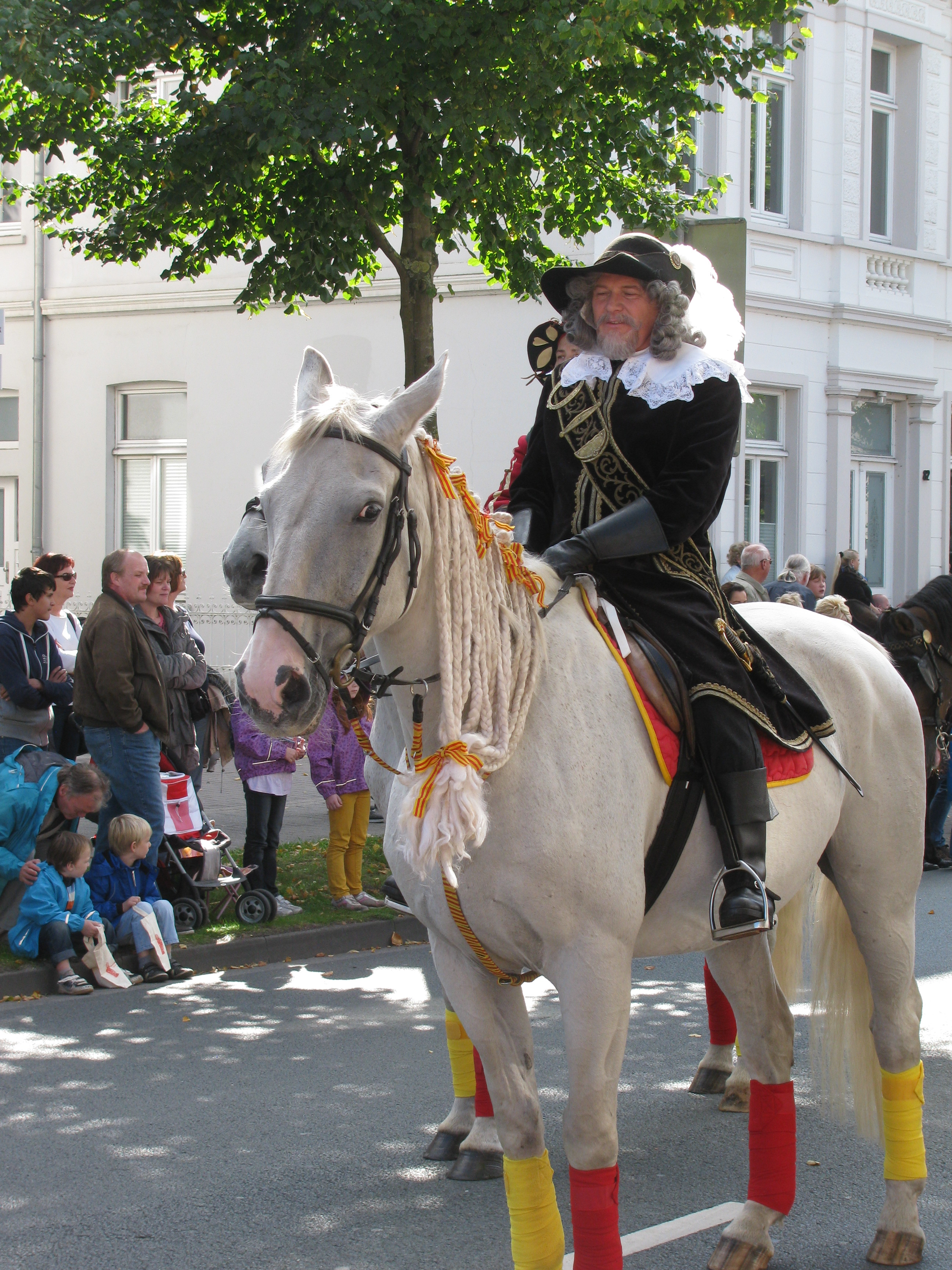 Kramermarktsumzug in Oldenburg anno 2013: Darstellung des Grafen Anton Günther, der den Kramermarkt 1608 gründete.